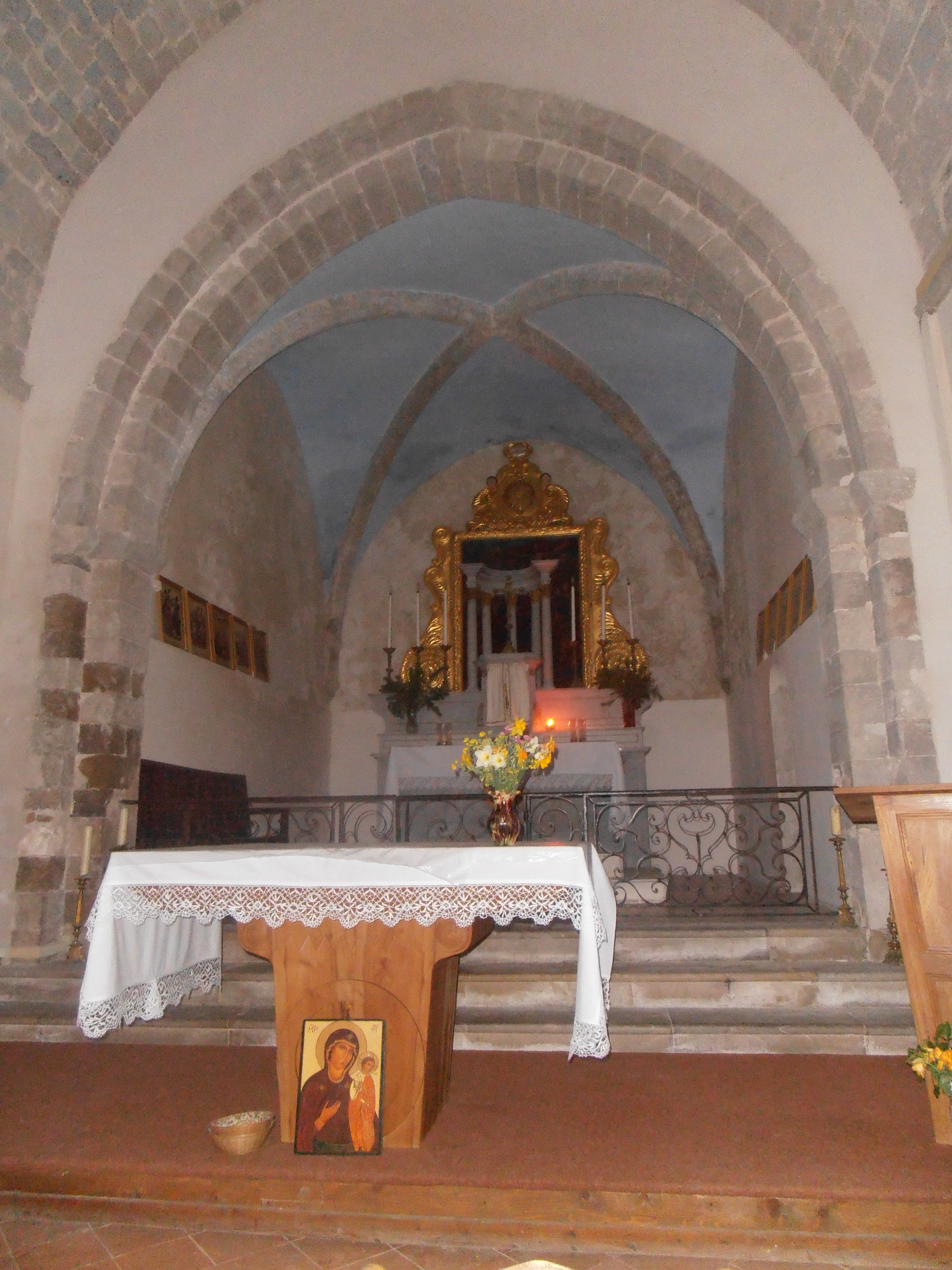 83 Fox-Ampux Choeur de l'église